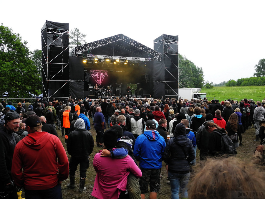 Hollandi death metal bänd Asphyx esineb muusikafestivalil Hard Rock Laager 2017.